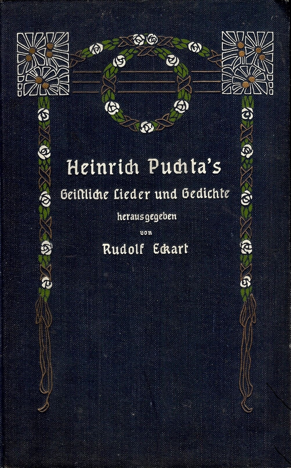 Heinrich Puchtas - Geistliche Lieder und Gedichte